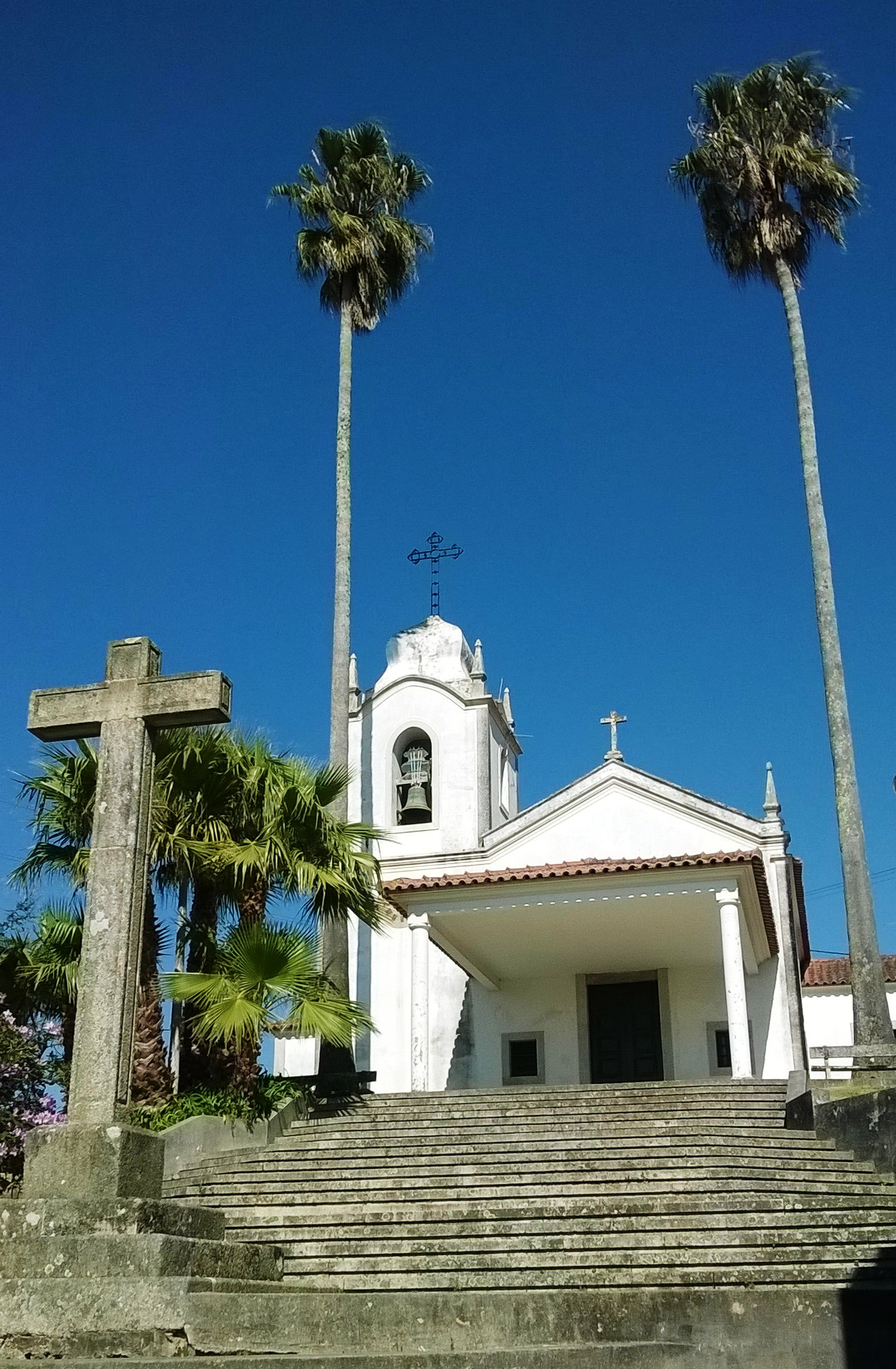 Capela de Nossa Senhora da Penha de França, Esmoriz, concelho de Ovar, distrito de Aveiro, Portugal.